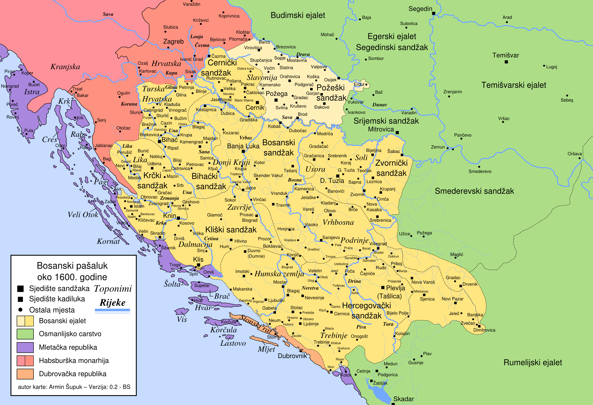 Bosanski pašaluk oko 1600. godine